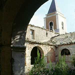 Intenro Convento Sant'Antonio Deliceto